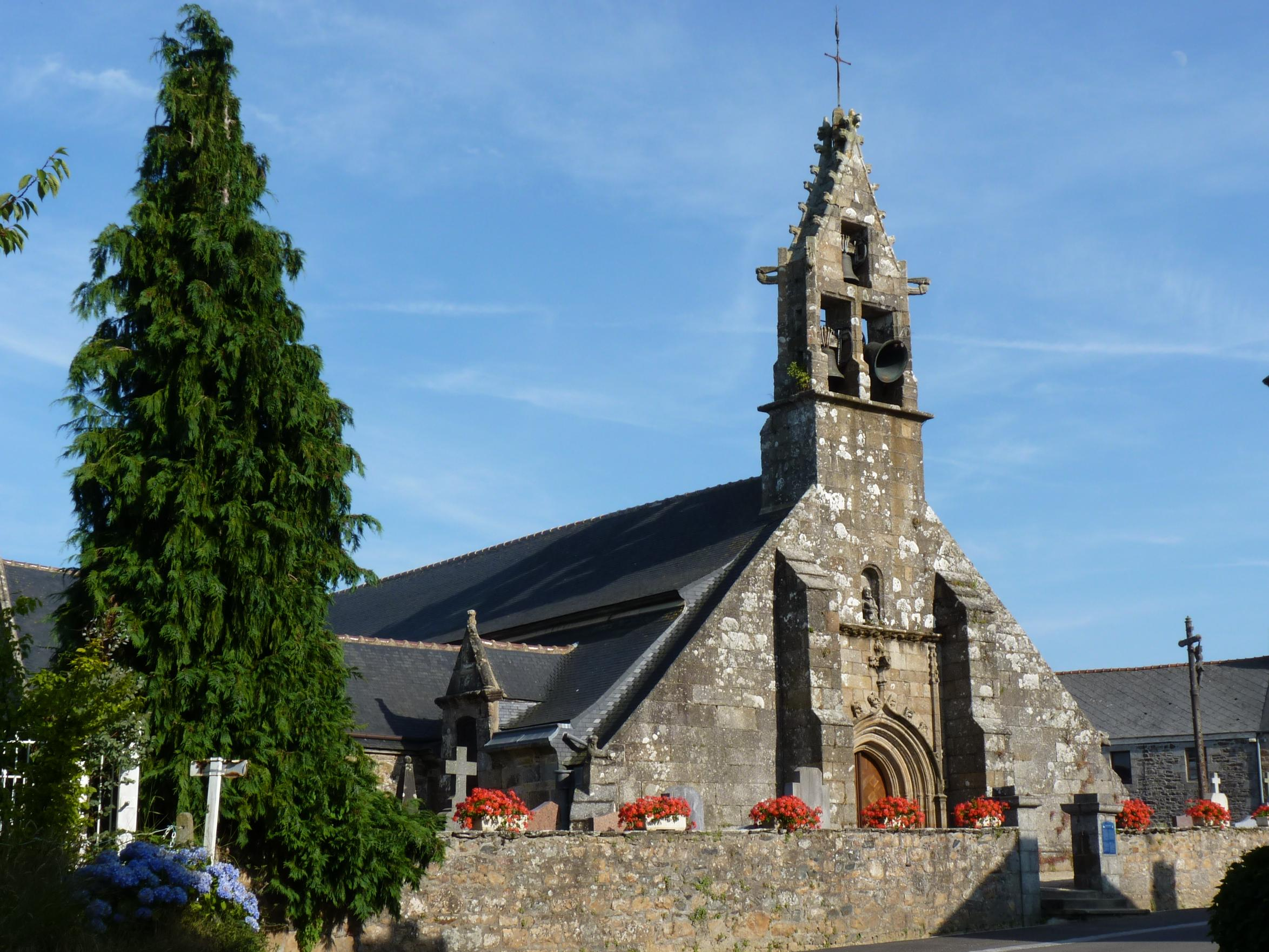 Eglise du 16ème siècle remaniée au 18ème siècle